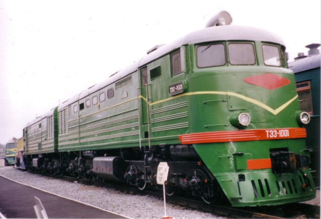 Spoorwegmuseum (vm. Warschaustation) te St. Petersburg, augustus 2002